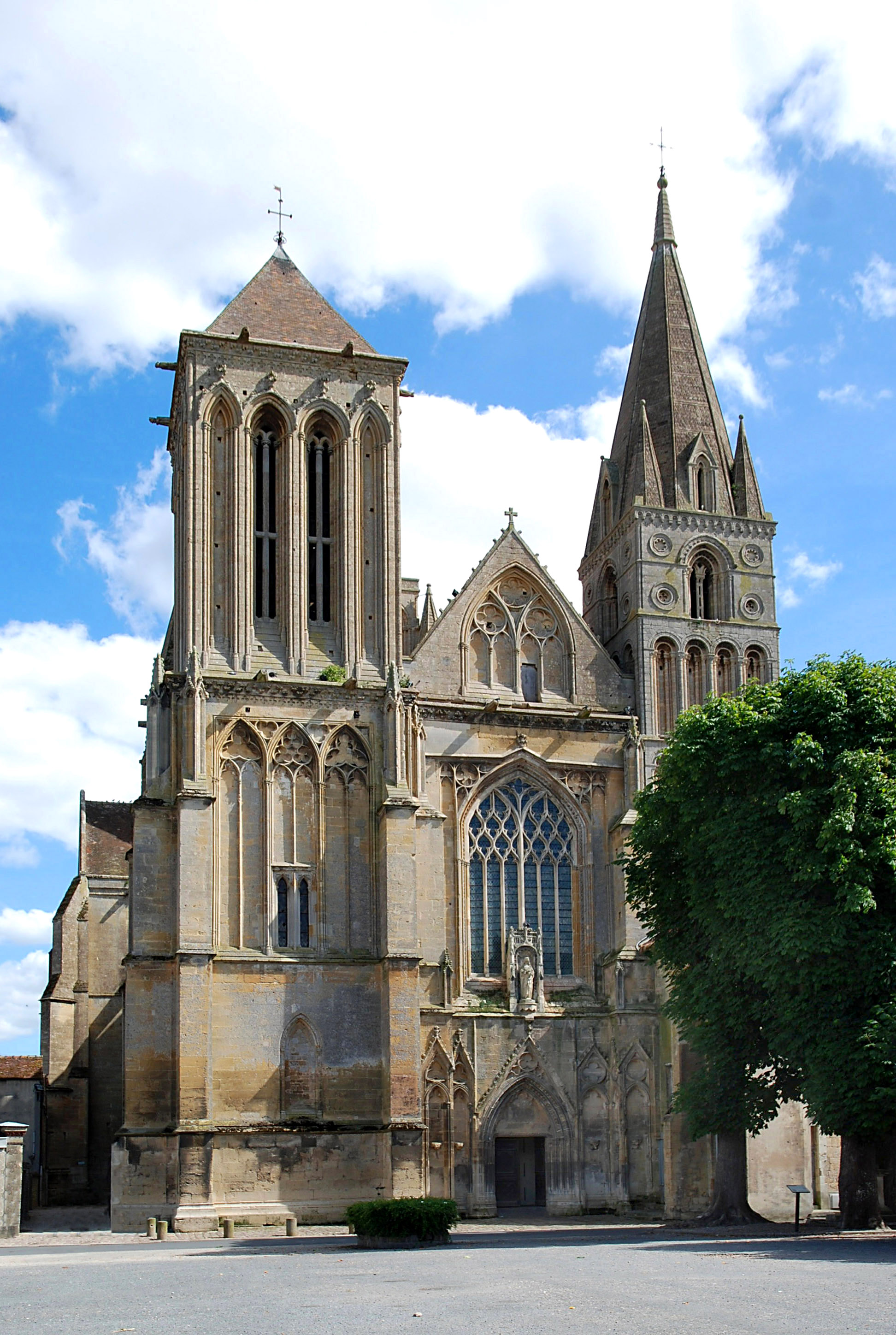 Saint-Pierre-sur-Dives (Calvados)